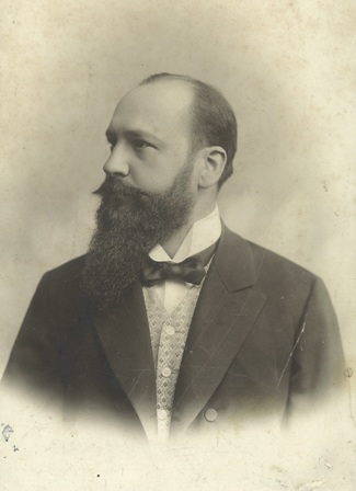 Portraitfoto Eduard Miglitz 1905